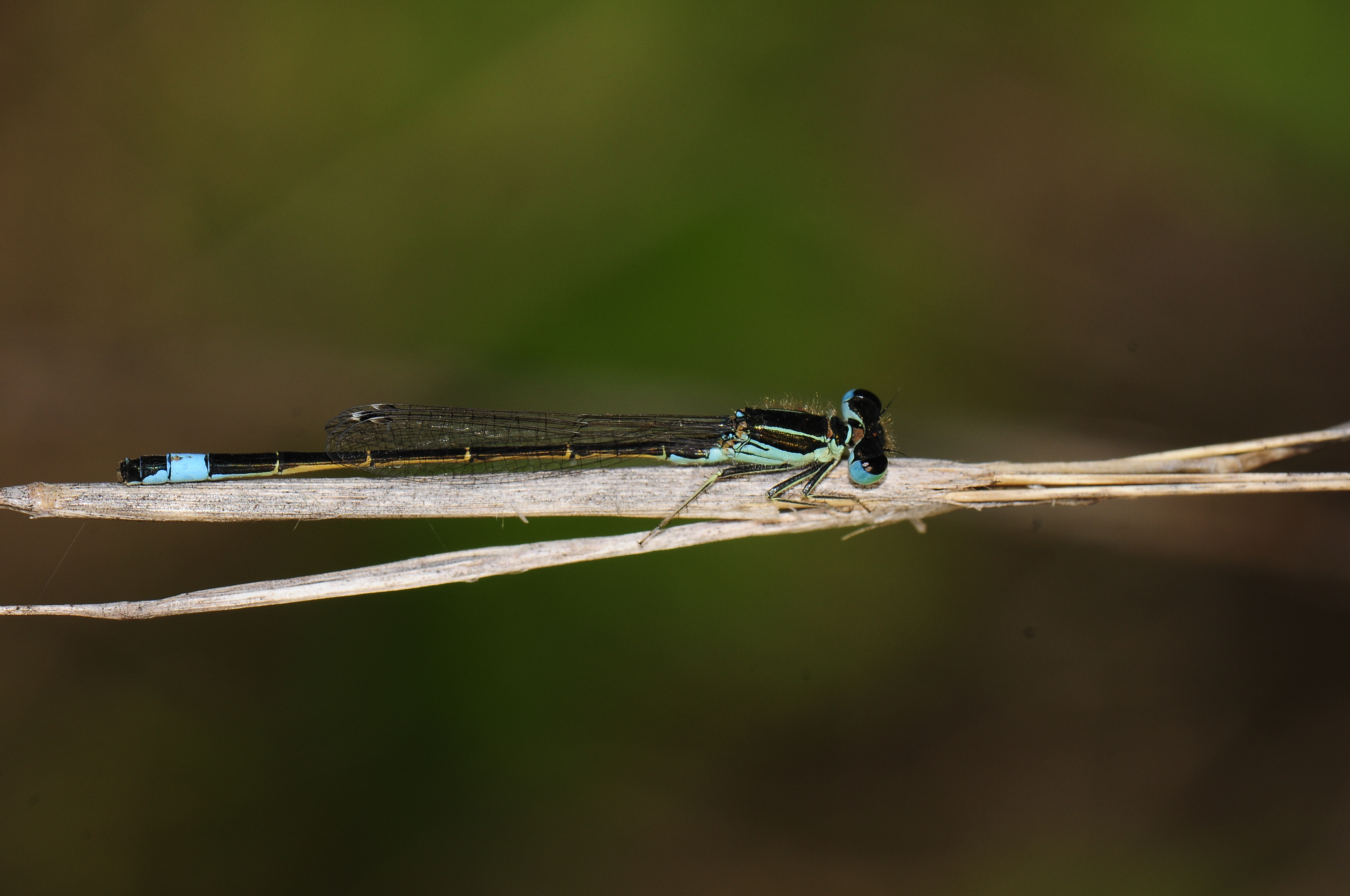 Ischnura graellsii, macho-male